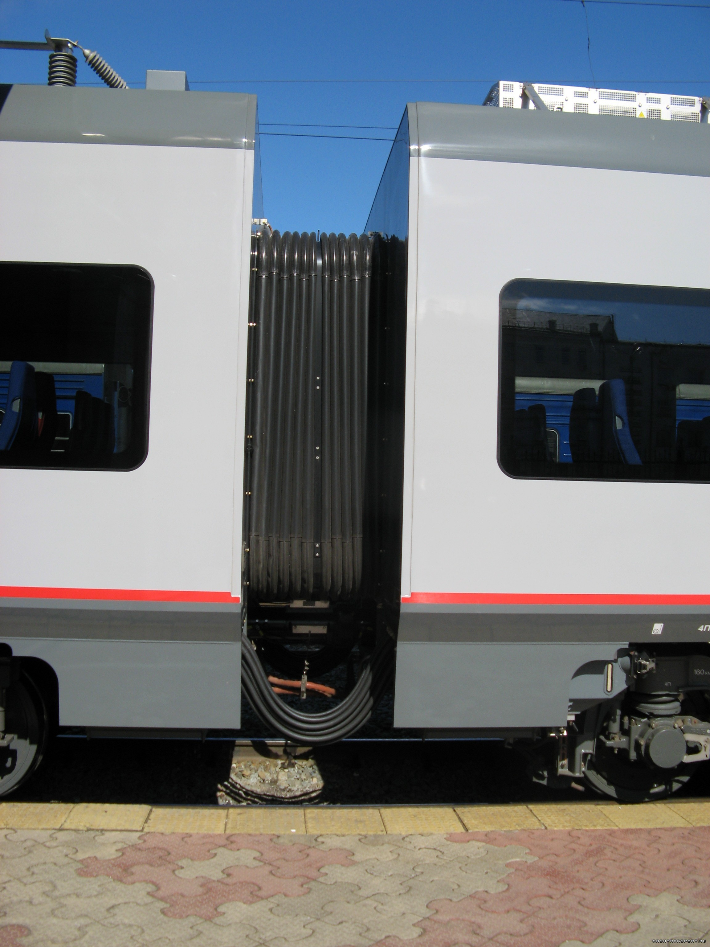 Межвагонье электропоезда ЭС1-015